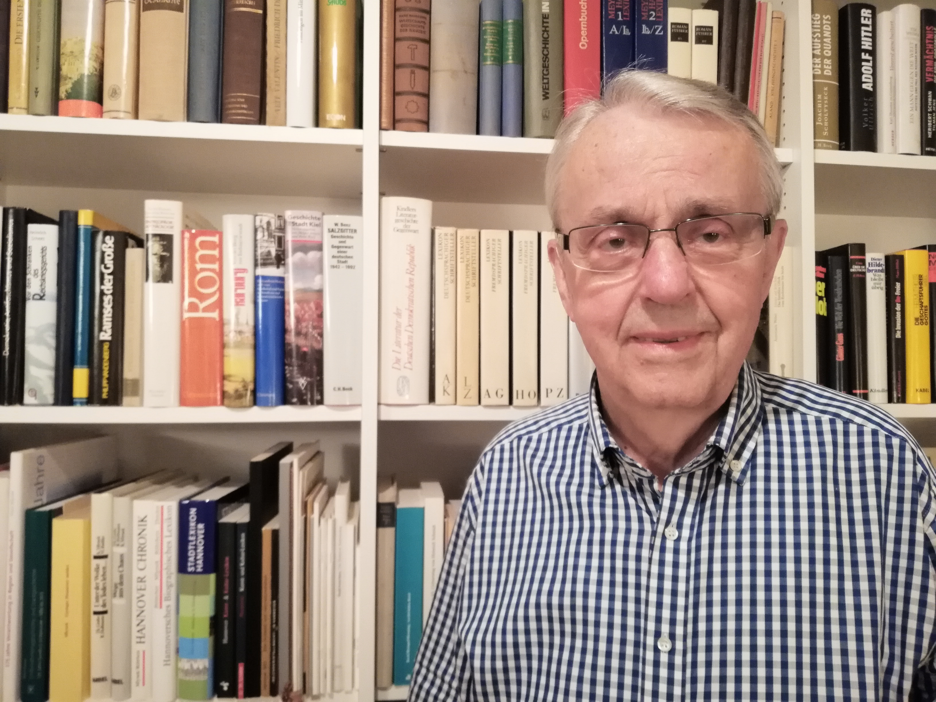 Der langjährige Leiter des Stadtarchivs Hannover und vielfache Buchautor Klaus Mlynek (* 1936), hier vor einer Bücherwand in seiner Wohnung mit Werken zur Geschichte Deutschlands und Hannover ...